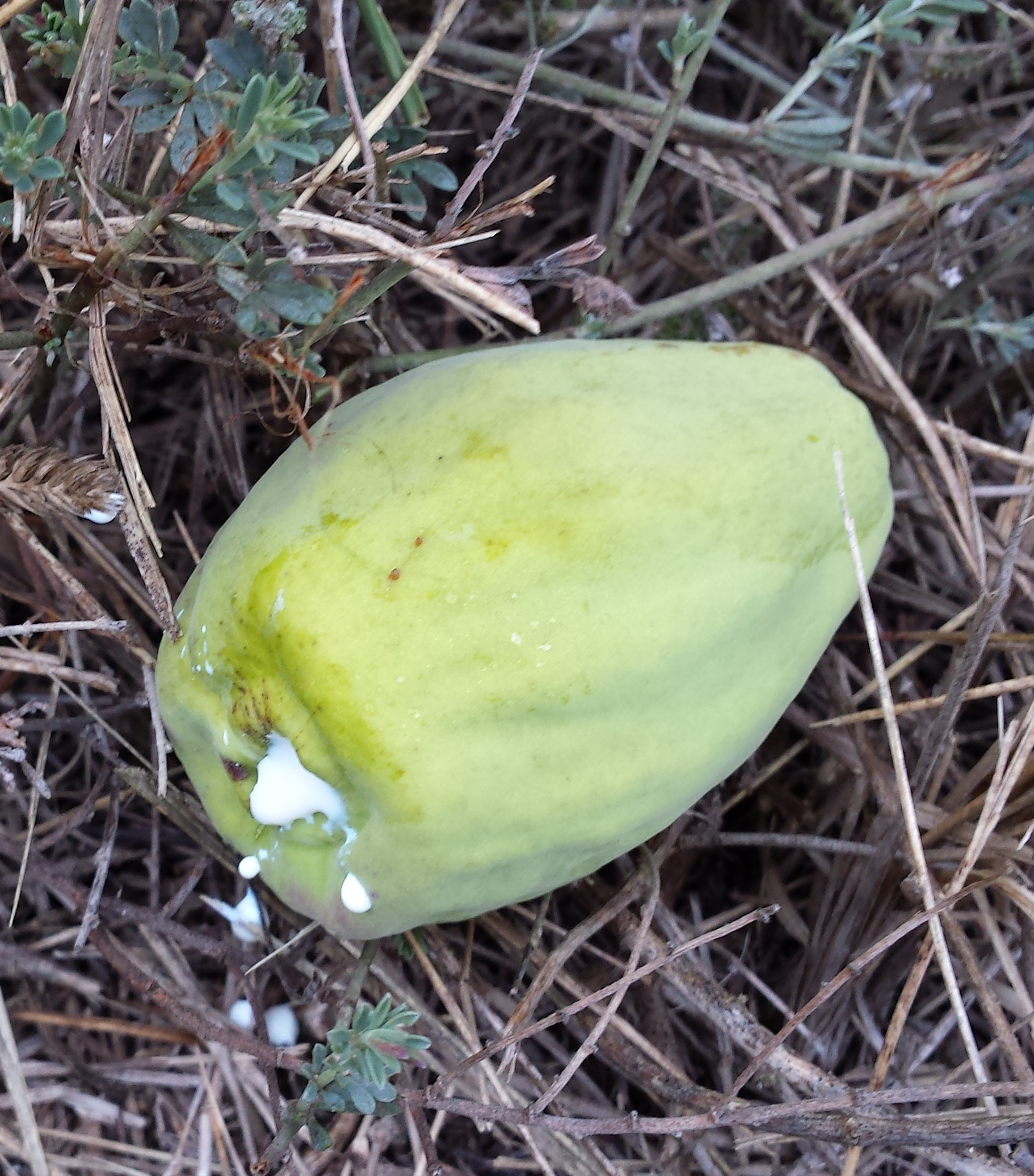 Làtex del fruit de la liana silvestre 'Araujia seracifera, Castelltallat, Bages